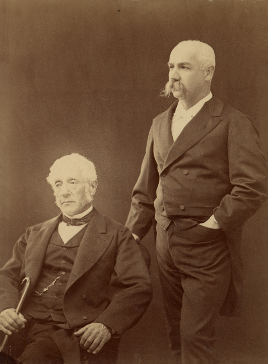 Benjamín Vicuña Mackenna y su padre, Pedro Felix Vicuña Aguirre.